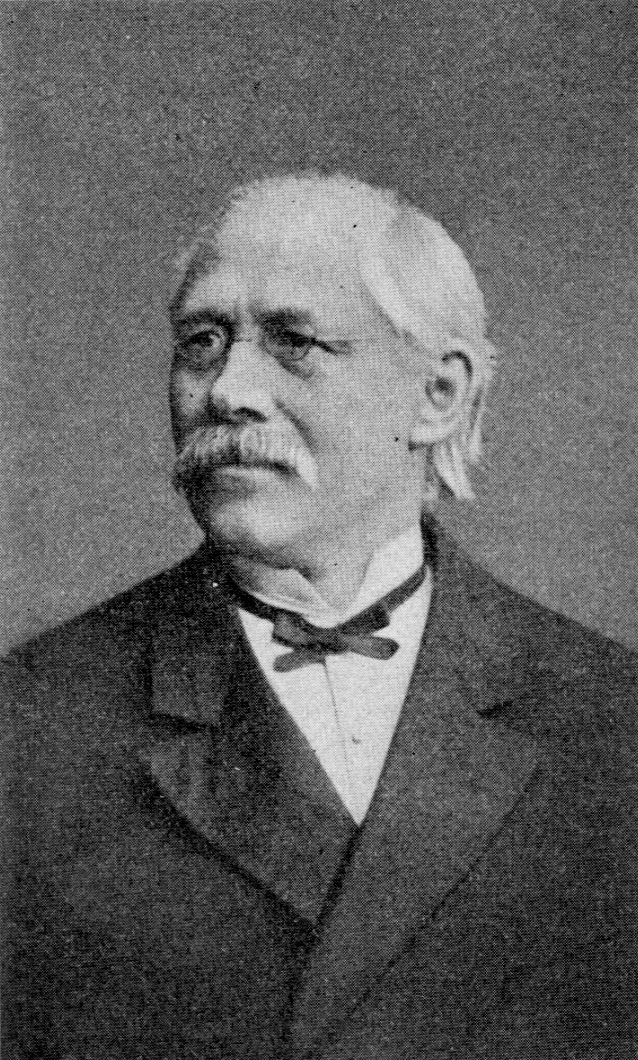 Friedrich Zarncke (1825—1891), German philologist